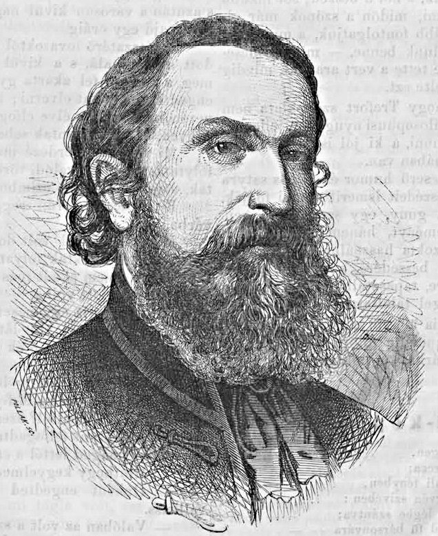 Trefort Ágoston (1817–1888) politikus, miniszter, a Magyar Tudományos Akadémia tagja. Pollák Zsigmond metszete